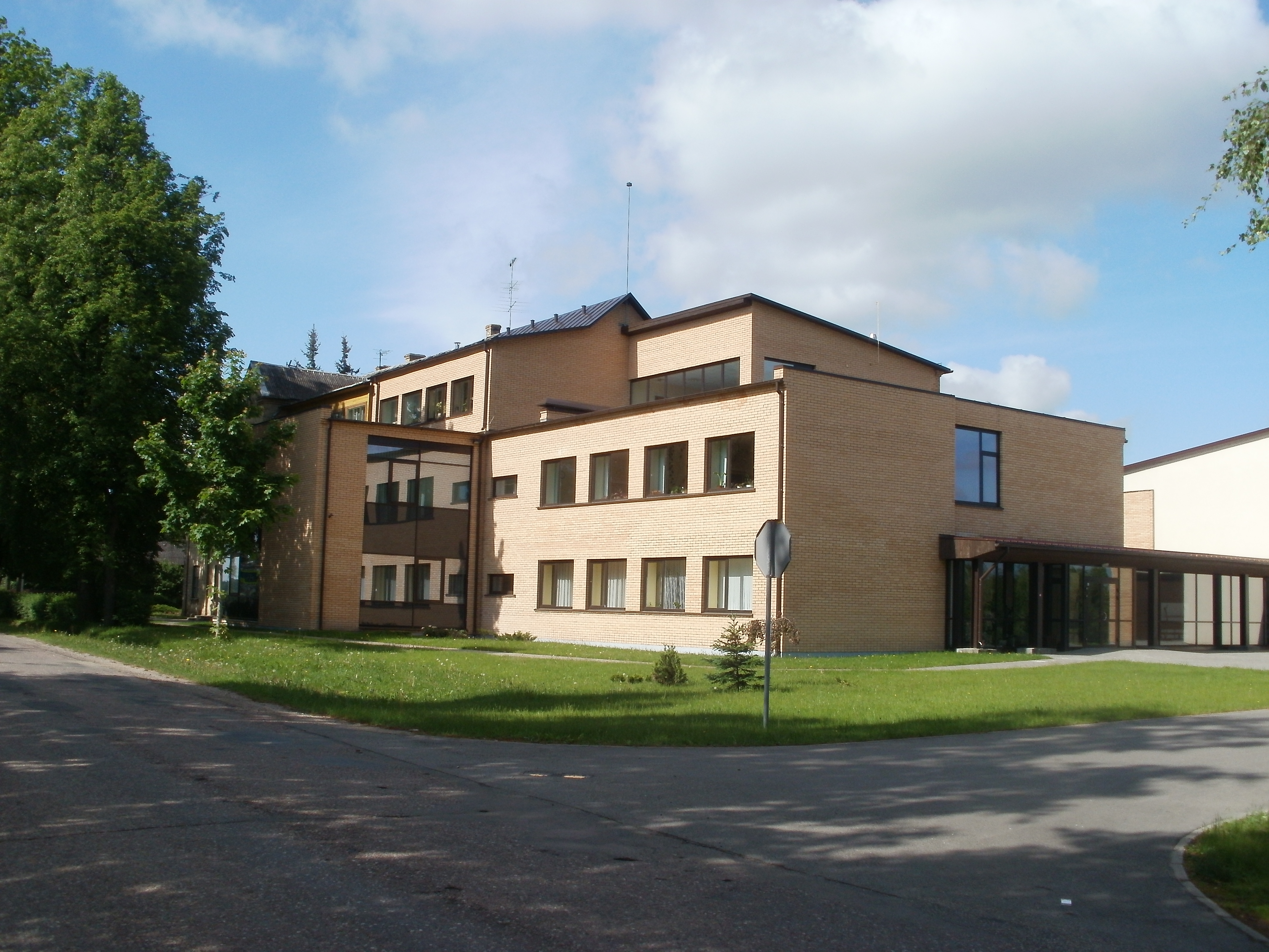 Kategorija:Svētes pagasts Kategorija:Skolas Latvijā